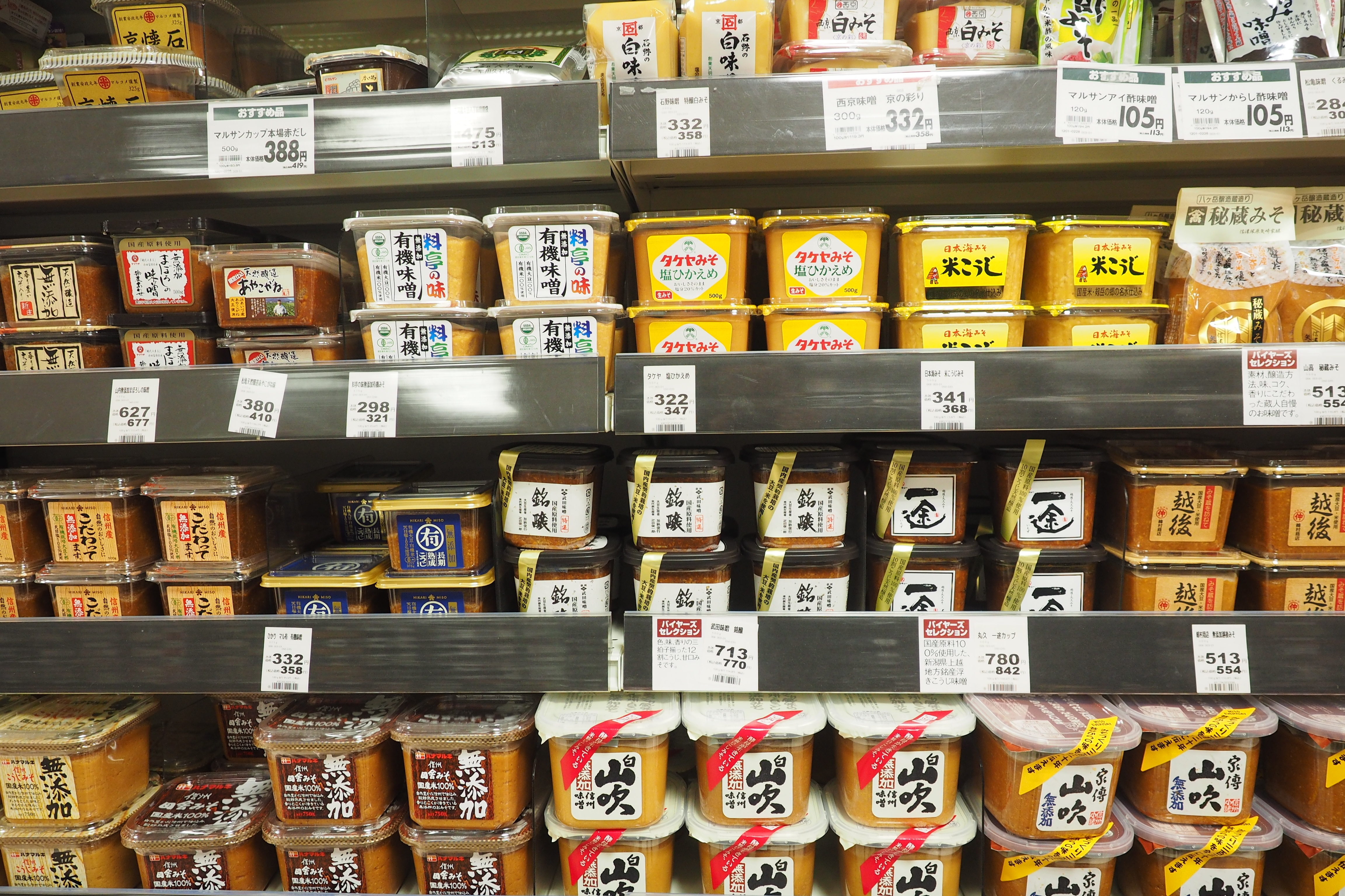 味增